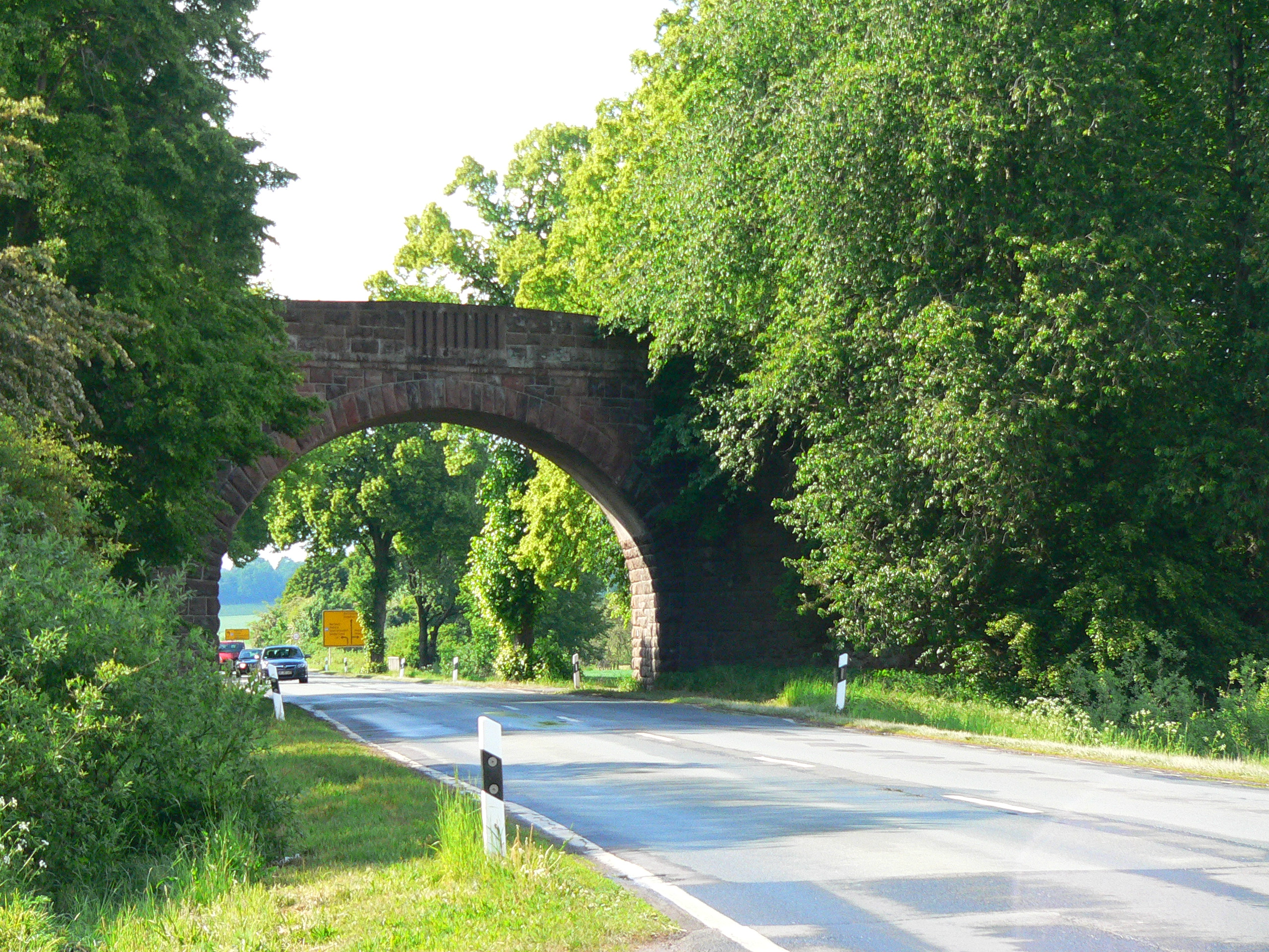 Wohratalbahn - Überführung über die L 3089 bei Kirchhain (Hessen).